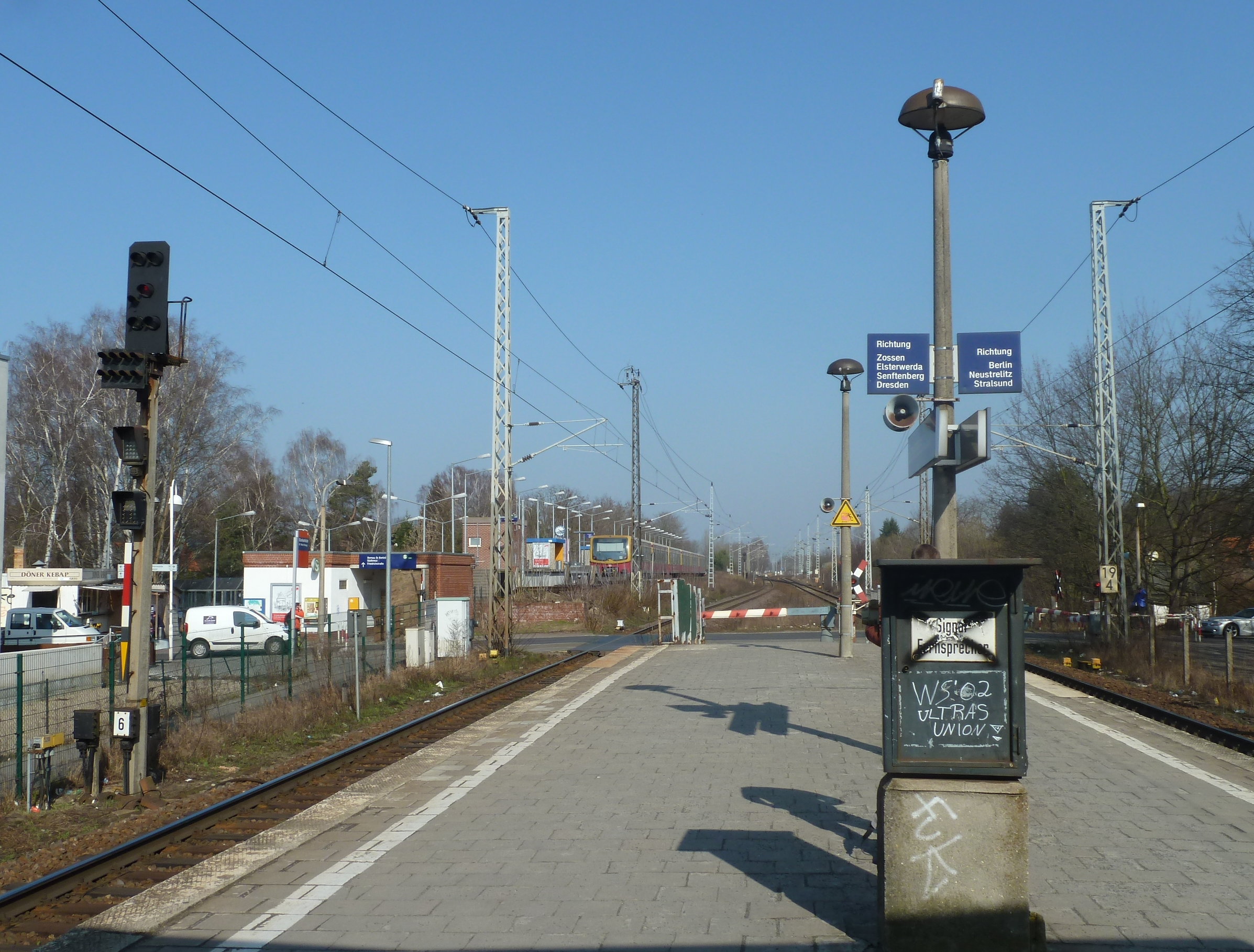 Bahnhof Blankenfelde, Regionalbahnsteig, im Hintergrund links der S-Bahnsteig